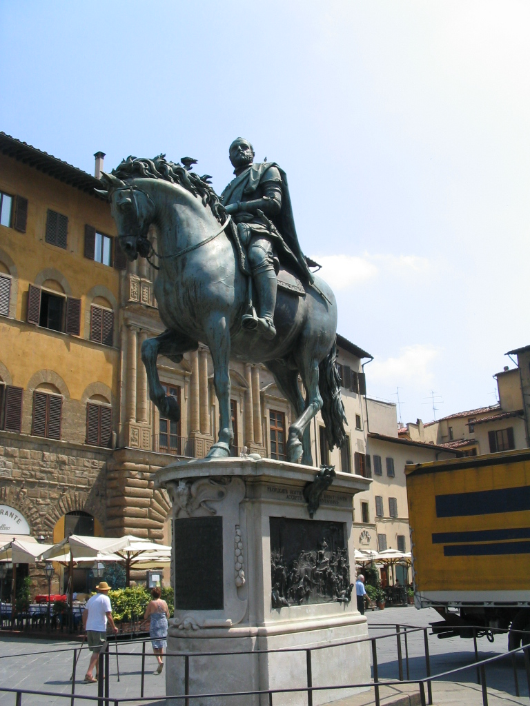 Equestrian statue of Ferdinando I de' Medici on the "Piazza Santissima Annunziata" in Florence, Italy.